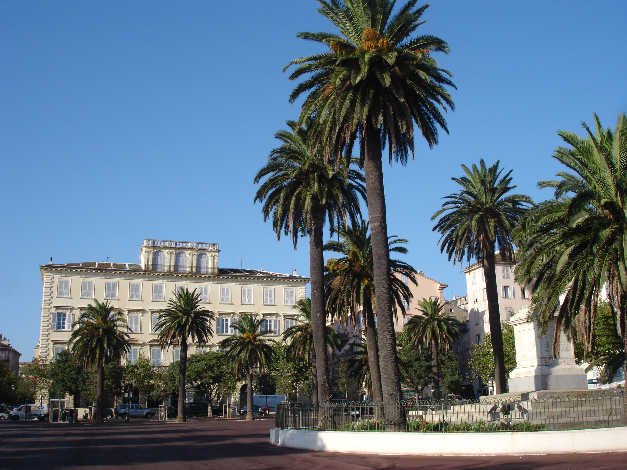 France, Haute-Corse (2B), Bastia, place Saint-Nicolas